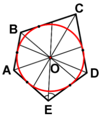 Окружность, вписанная в многоугольник